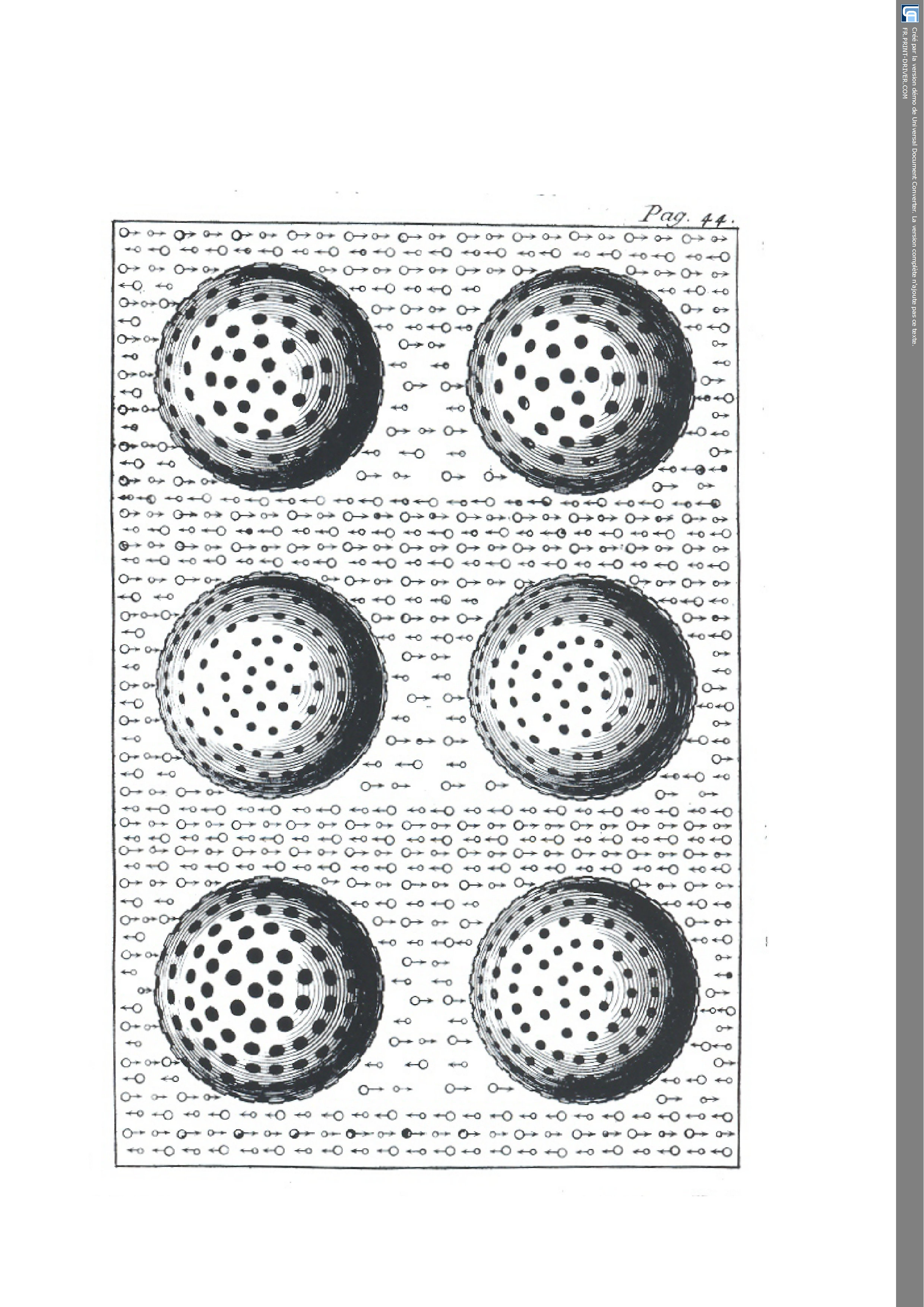 Représentation de différents corpuscules de matière et des corpuscules ultramondains qui les font mouvoir.